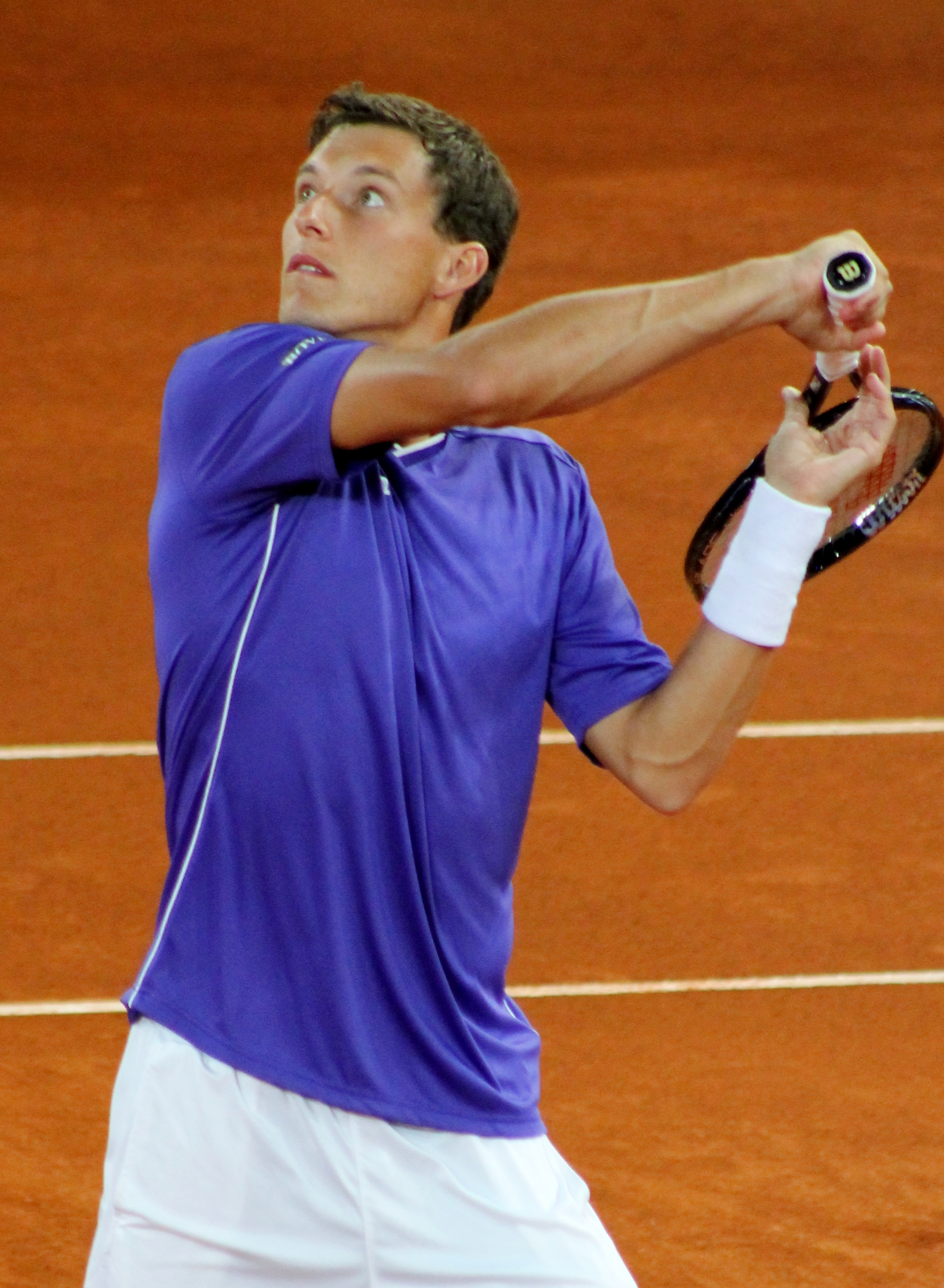 Carreno Busta MA14 (1) - Copy